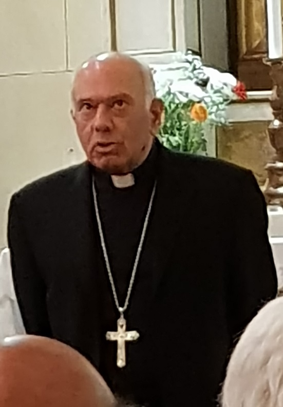 Sevastianos Rossolatos, archevêque catholique d'Athènes